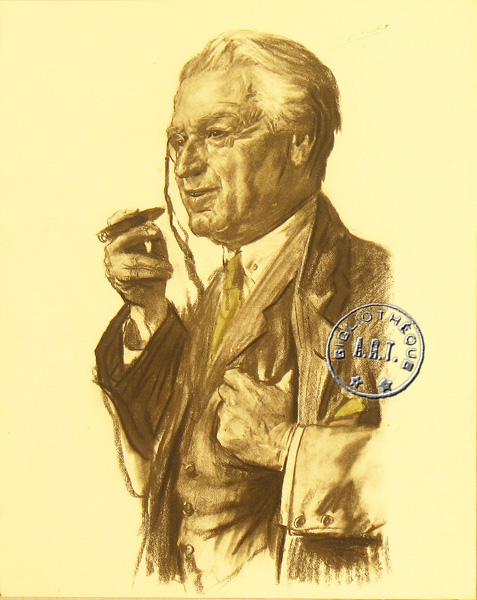 Les sociétaires de la Comédie Française, 1922